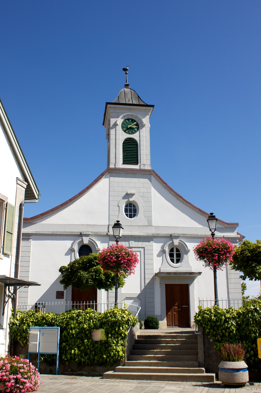 Temple de Préverenges